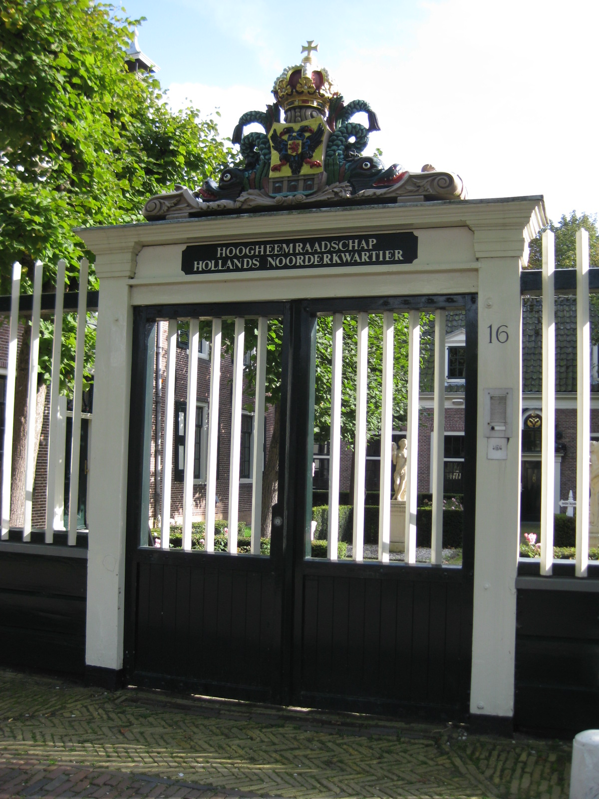 Poort Schepenmakersdijk 16, Edam